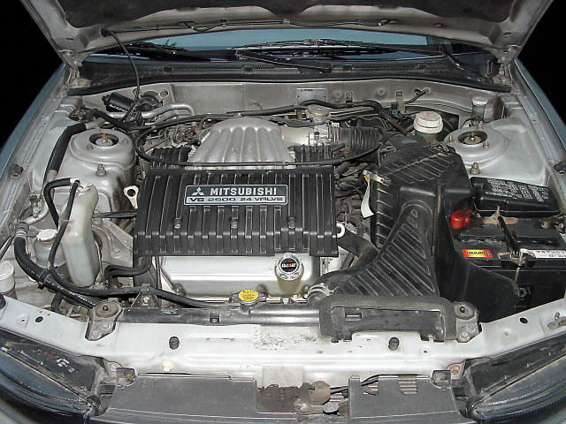 Mitsubishi Galant EA0 Motor 2.5 V6 Benziner